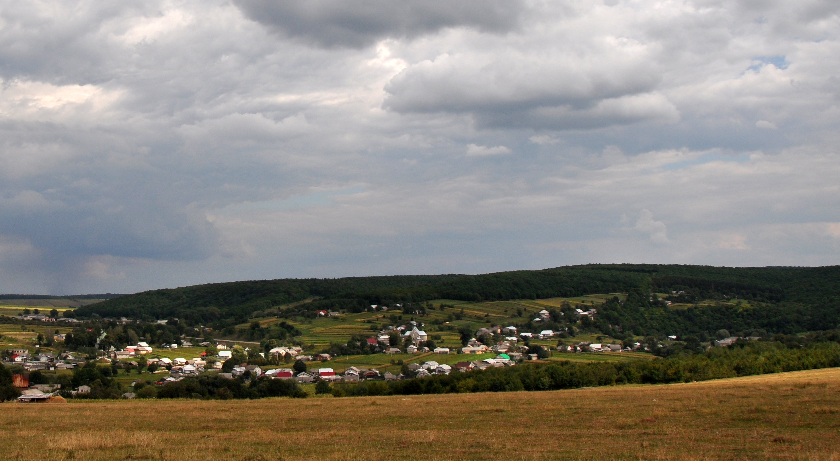 Панорама села Порохова Бучацького району Тернопільської області.